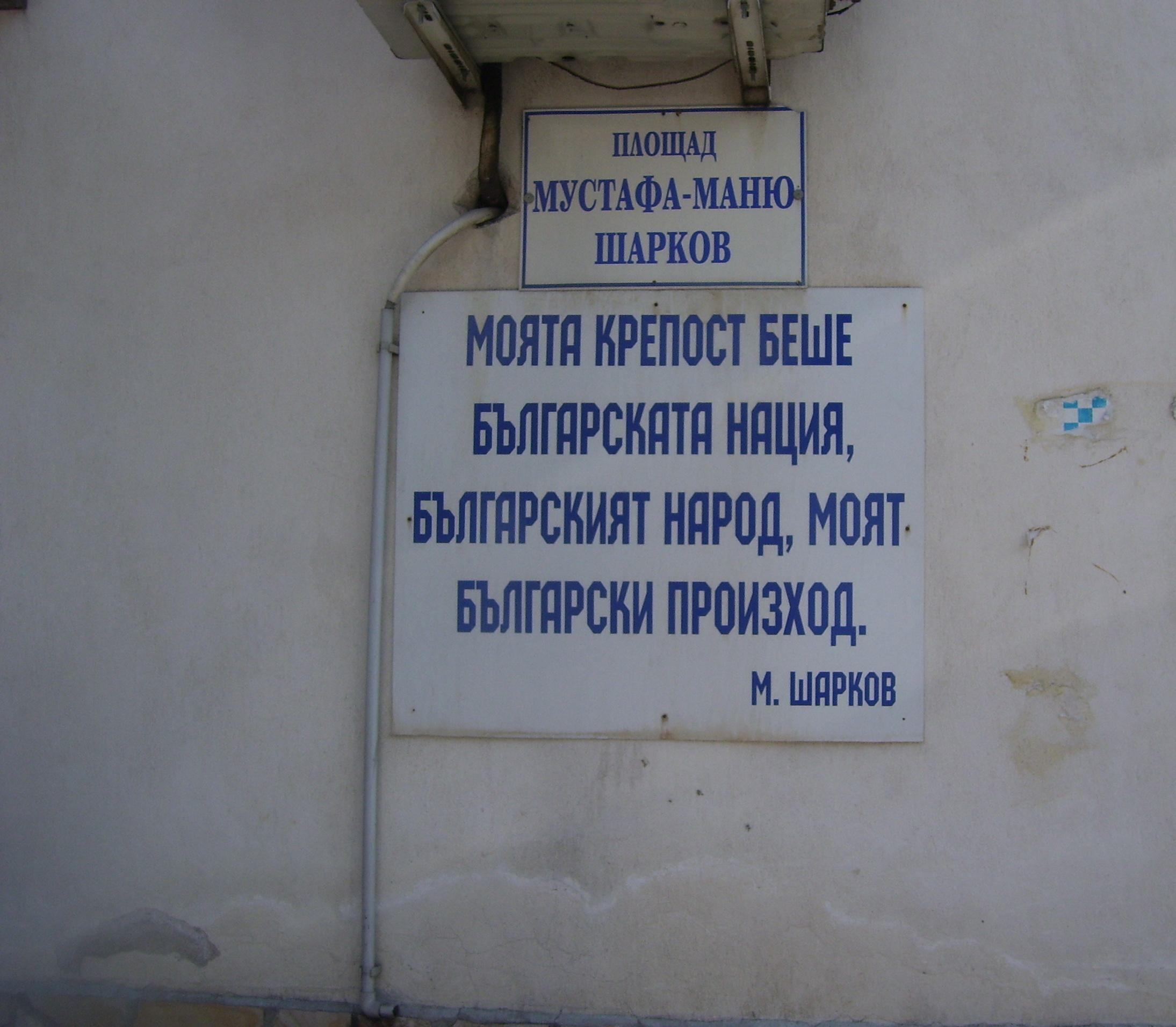 Табела на площад "Маню Шарков" във Велинград.